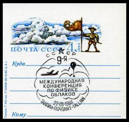 Почтовая оригинальная марка СССР из маркированной почтовой карточки со спецгашением. 9-я Международная конференция по физике облаков в Таллине, 1984.